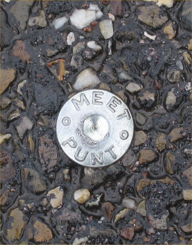 Meetpunt